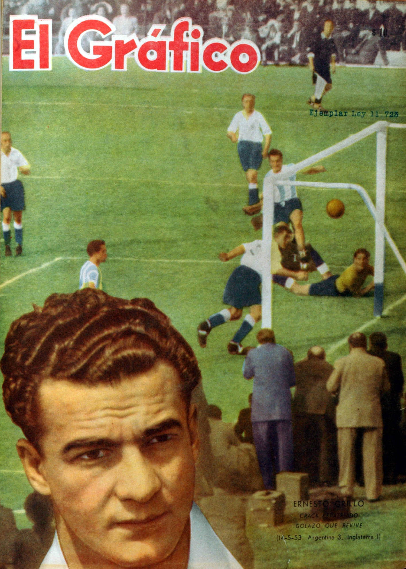 El Grafico del 25 de Mayo de 1960. Edicion 2122